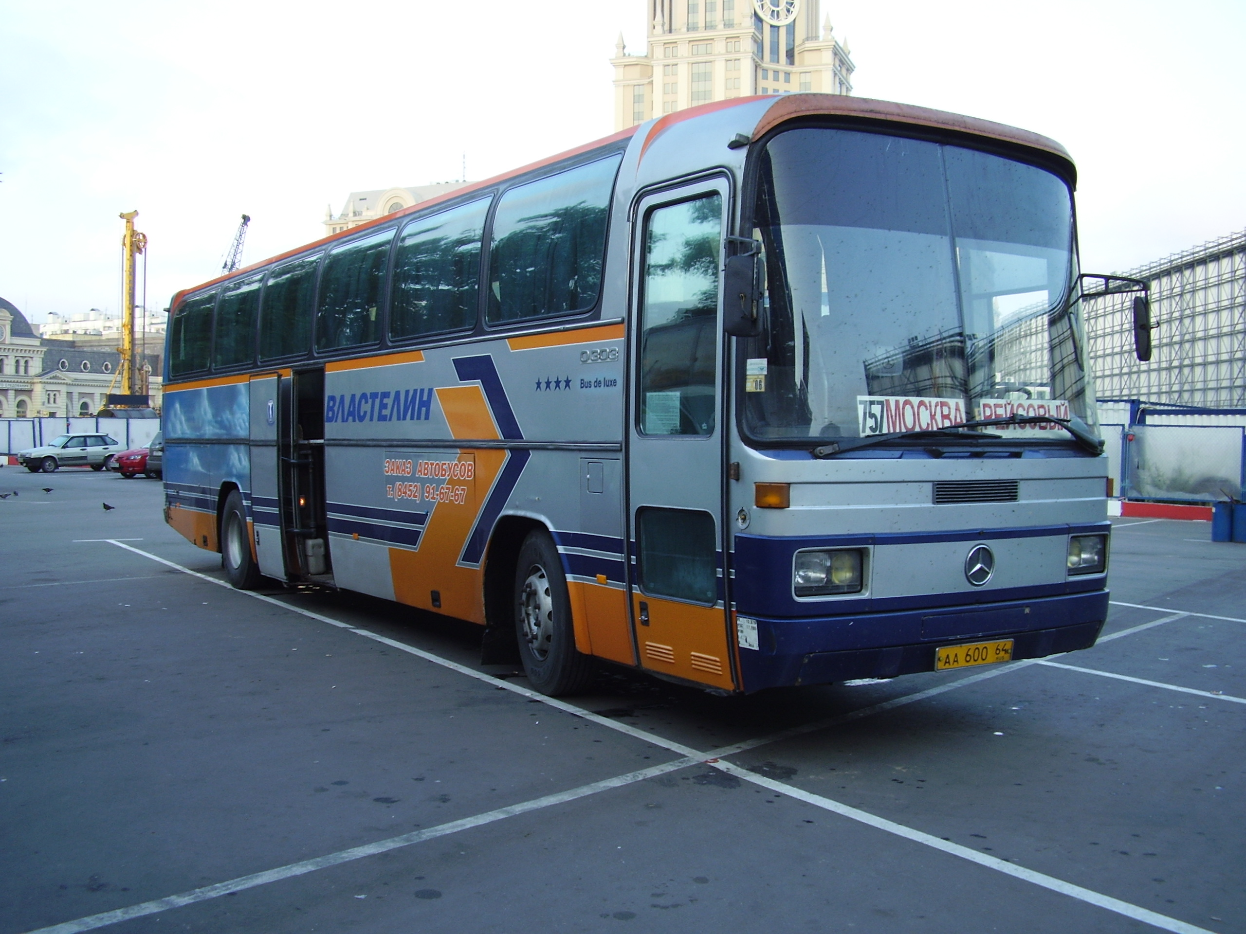 Автобус Mercedes-Benz_O303 в Москве